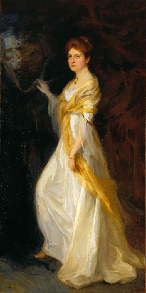 Marquise Hélie de Noailles, née Corisande Emma Louise Ida de Gramont